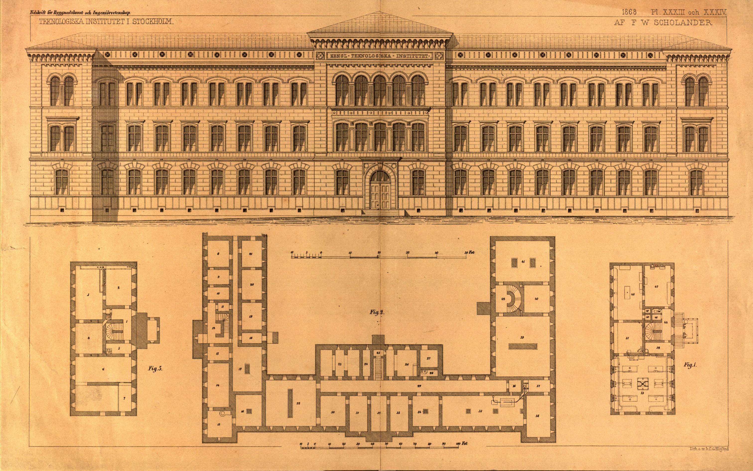 Tekniska institutet, ritning huvudfasad och bottenvåning